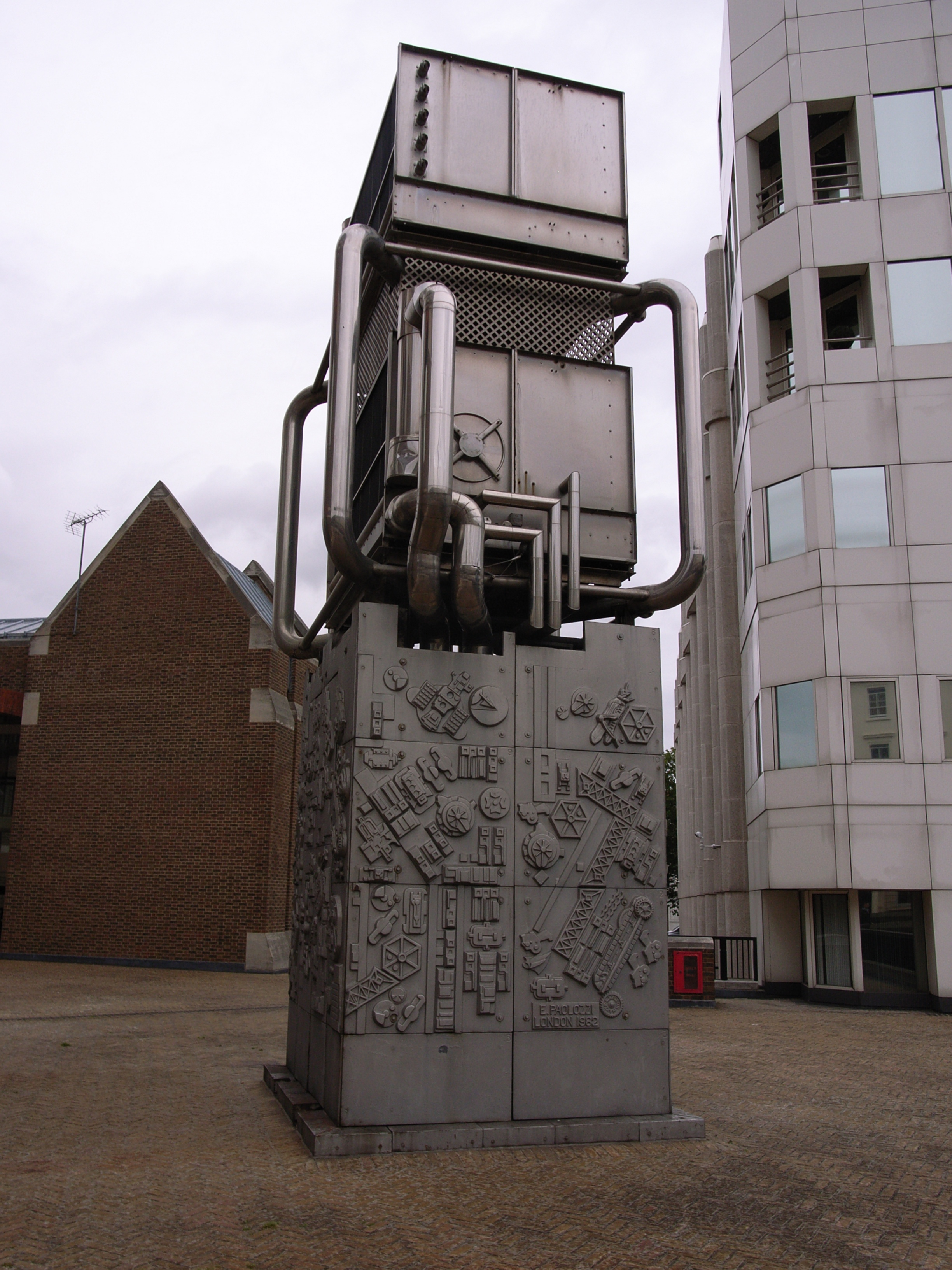 Eduardo Paolozzi sculpture (1982) near Pimlico tube station, London